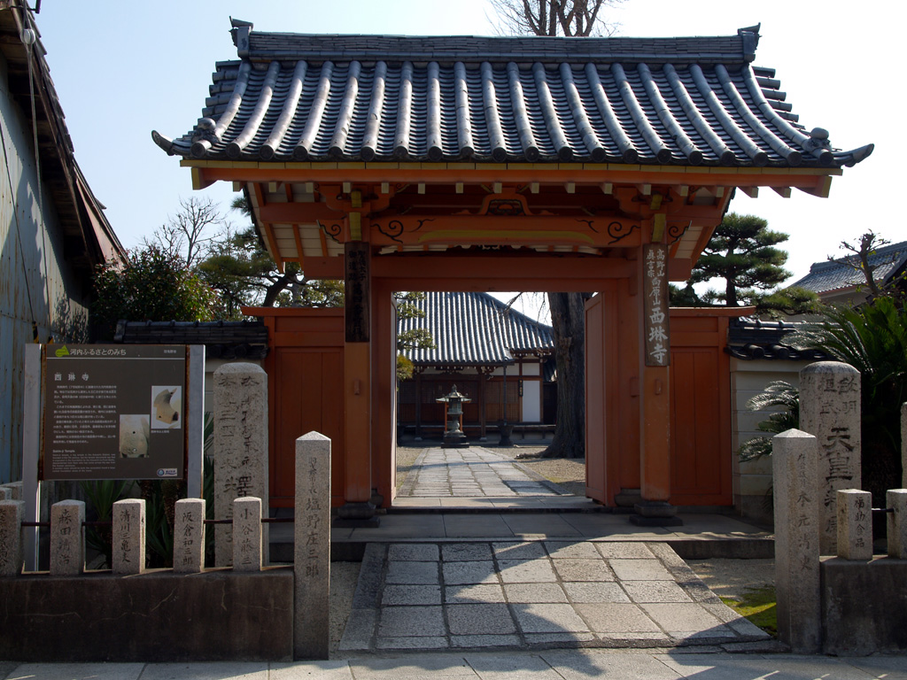 西琳寺 所在地：大阪府羽曳野市古市2‐3‐2